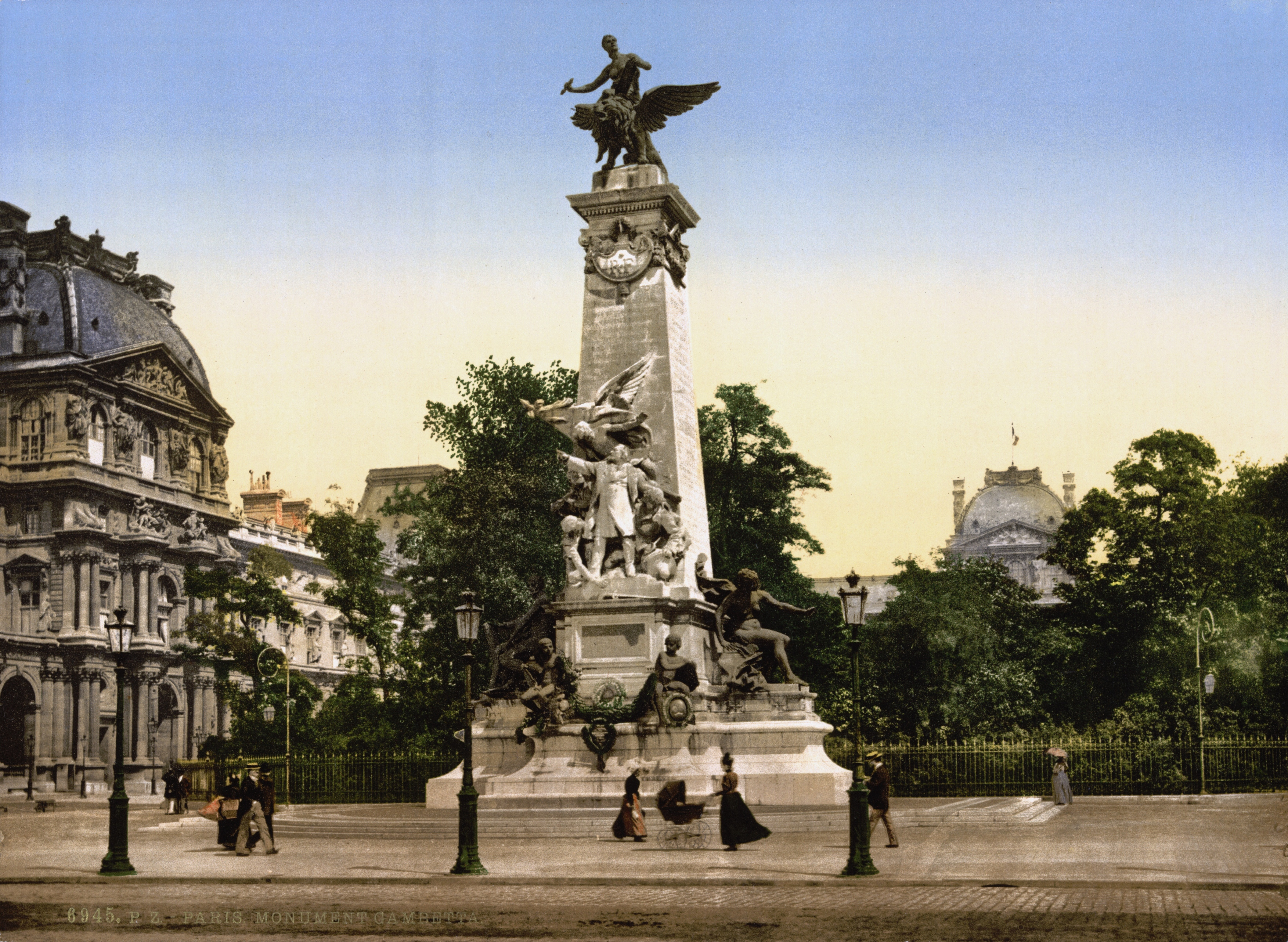 Gambetta's monument, Paris, France.